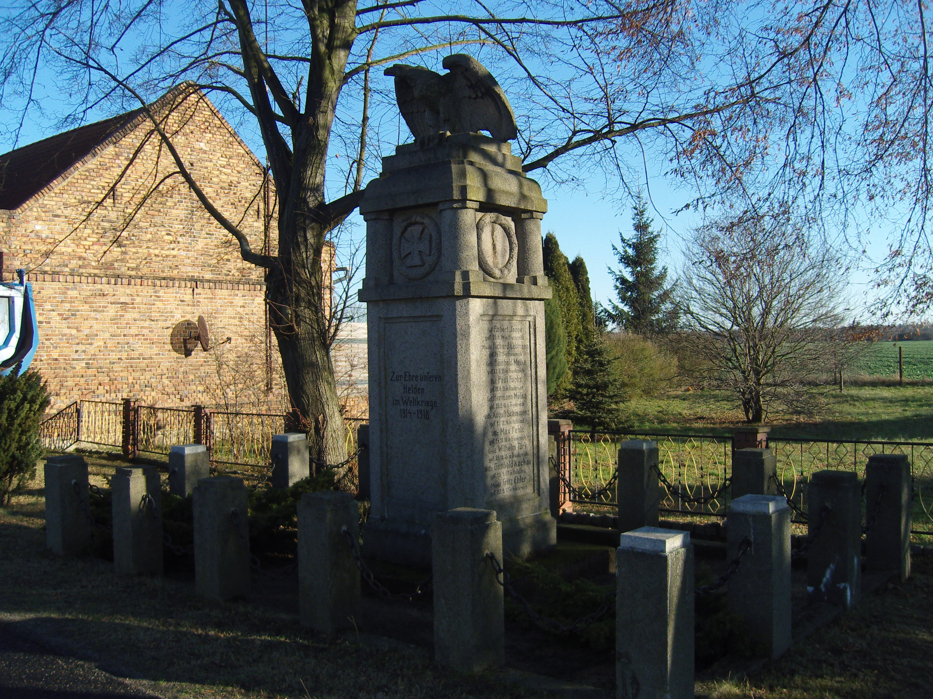 Kriegerdenkmal für die Gefallenen des Ersten Weltkriegs in Bahnsdorf, Niederlausitz